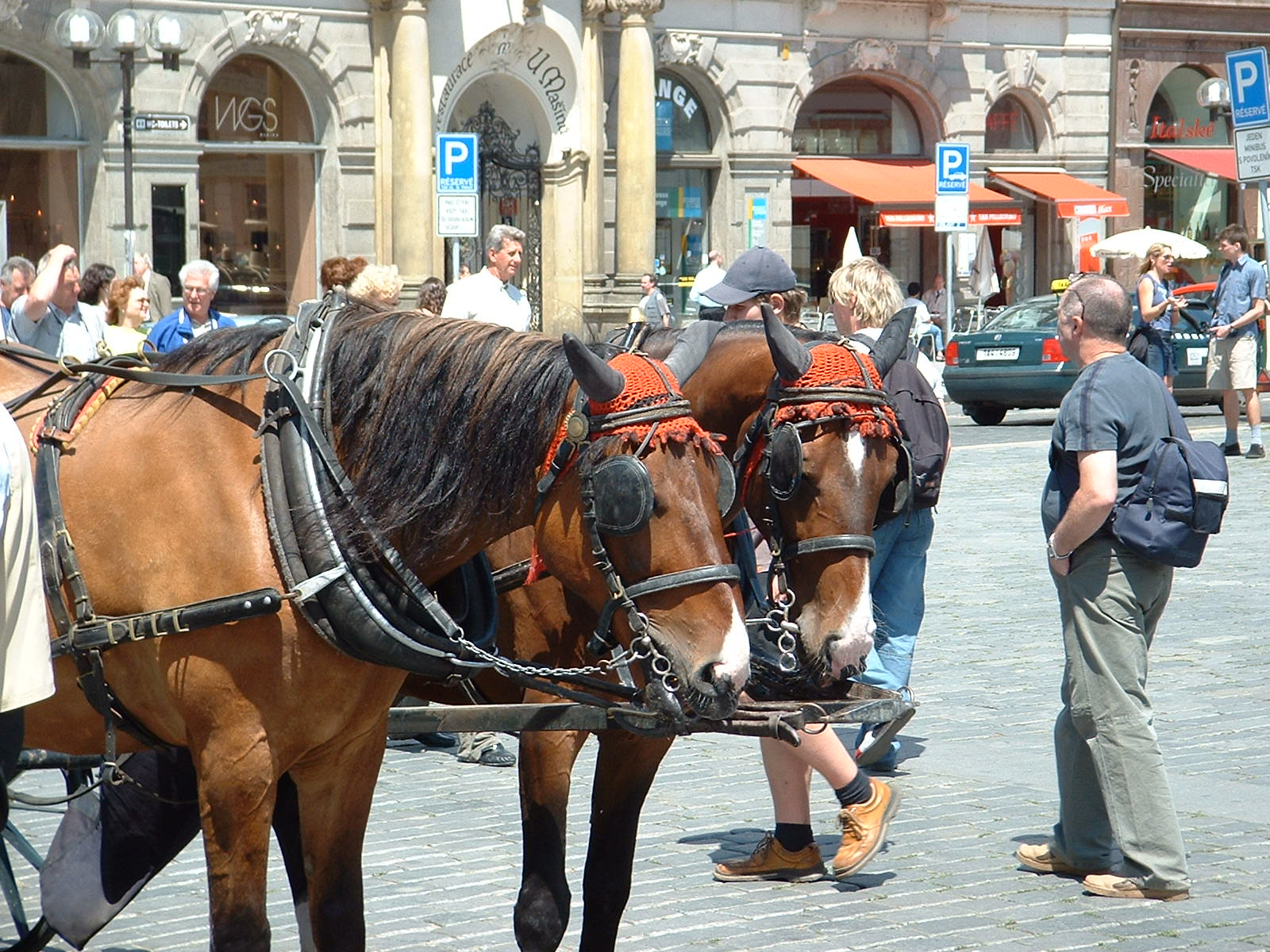 Kutschpferde